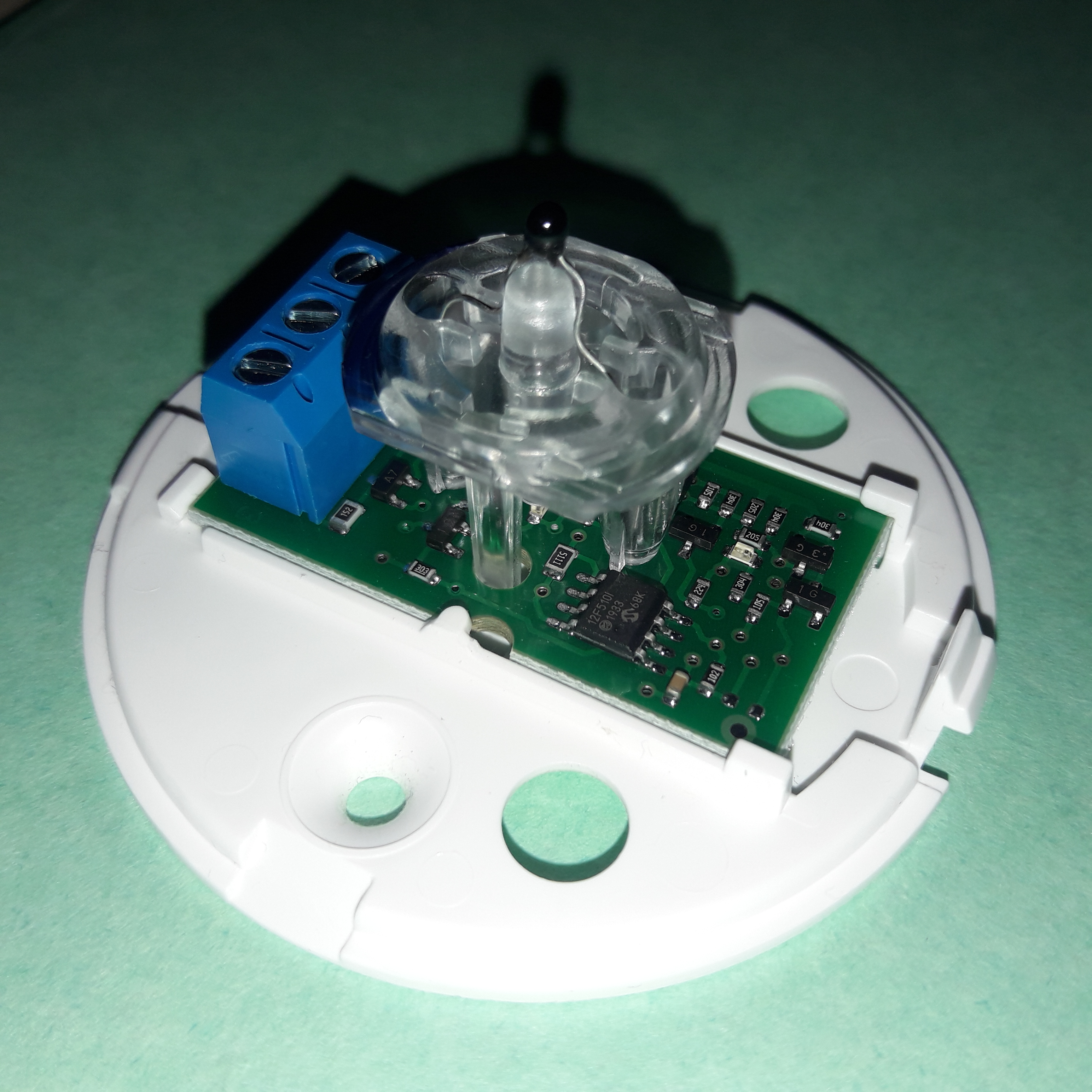 Тепловой пожарный извещатель ИП 101-1А-А3